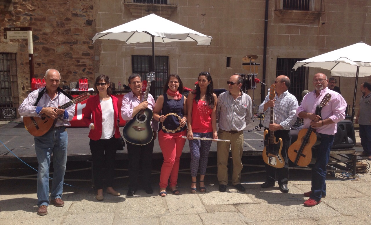 Manantial Folk con Manolo H. H. y Mara Peterssen en el programa "España, vuelta y vuelta" de RNE, en Cáceres.